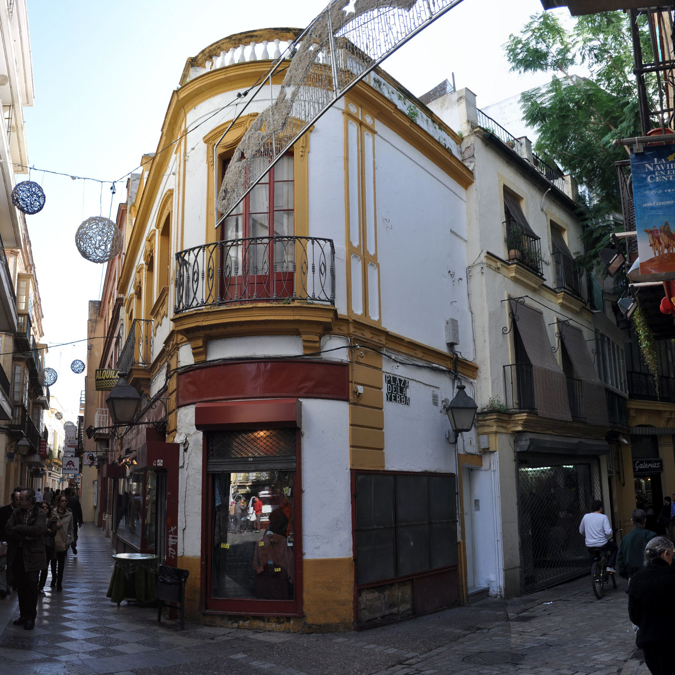 Calle Algarve esquina con Plaza de la Yerba, Jerez de la Frontera